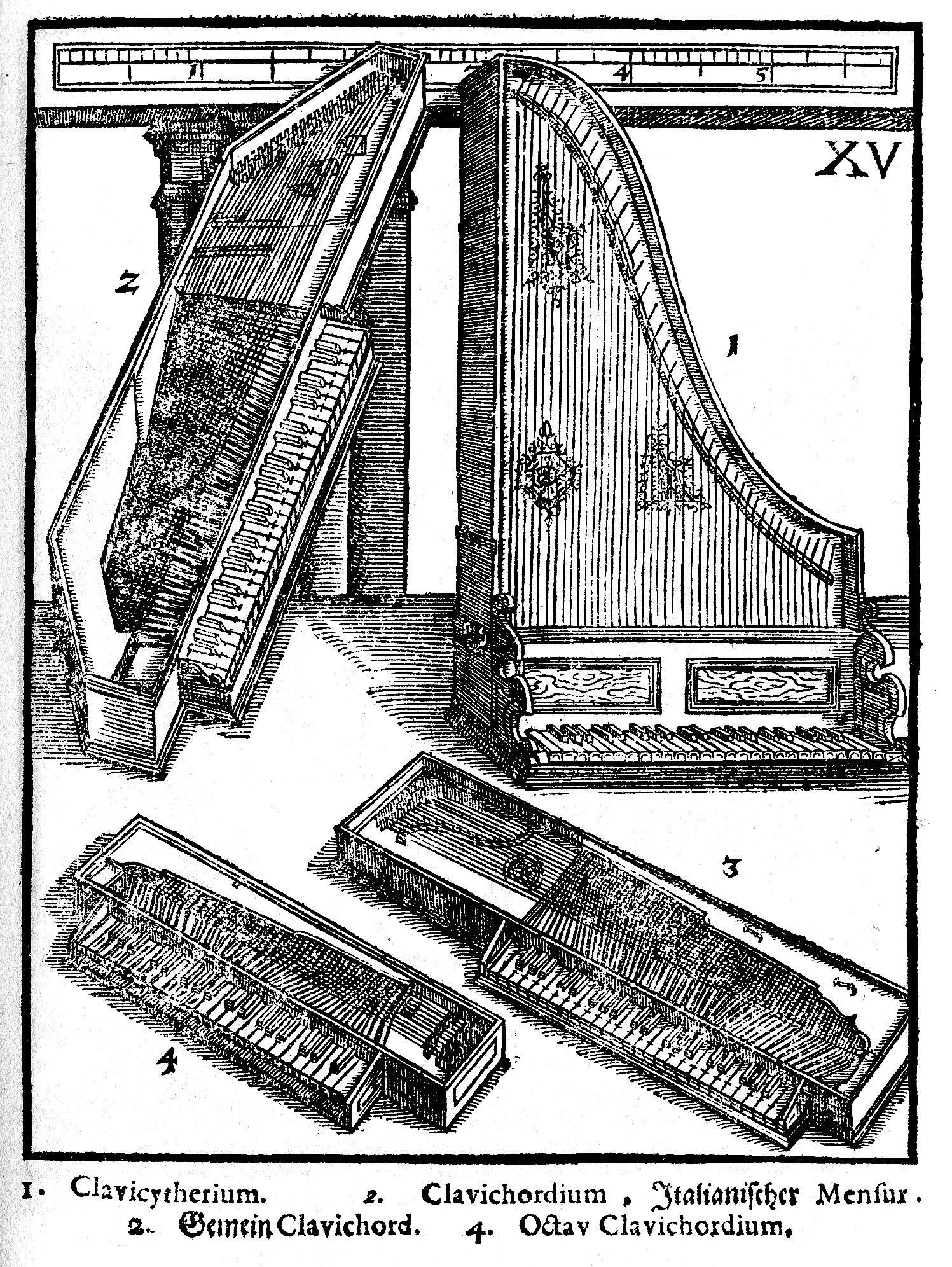 Syntagma Musicum Theatrum Instrumentorum seu Sciagraphia Wolfenbüttel 1620